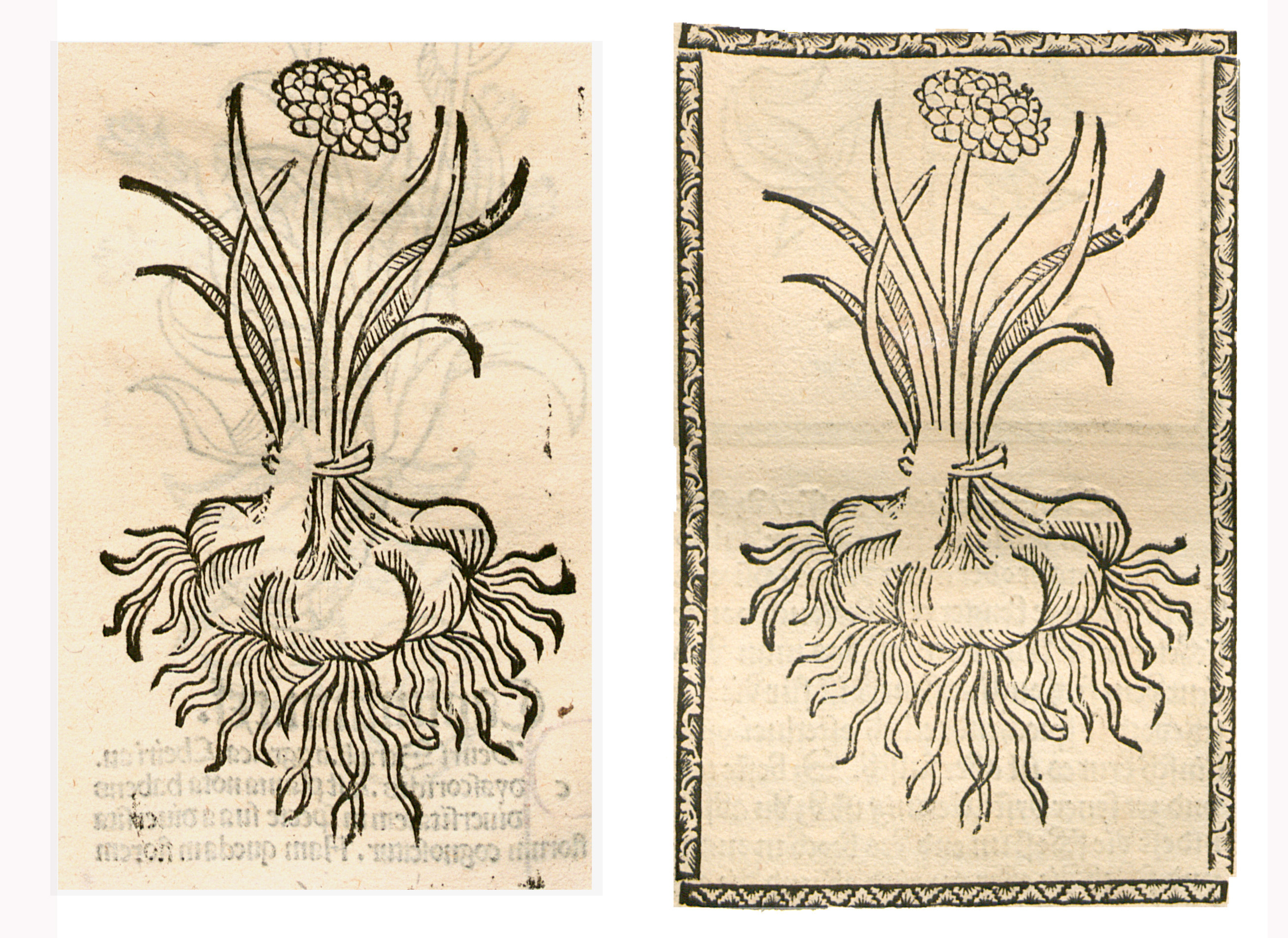 Abbildung von: Zibeln (Allium cepa var. Cepa)